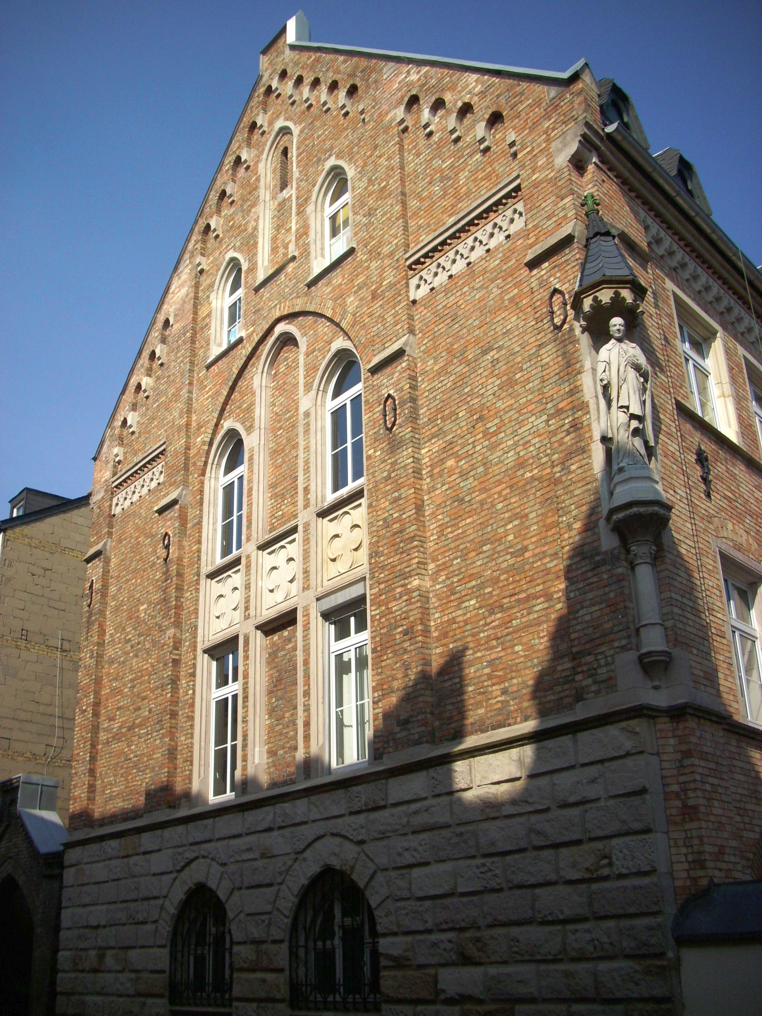 Ehemaliges St. Vinzenz- und Elisabeth-Hospital; Zweiflügelanlage mit Mittelrisaliten, neugotische Motive, 1868–70, Architekt Josef Wessicken, Erweiterung 1893/94, Architekt Peter Gustav Rühl, und 1899/1900, Architekt Franz Gill